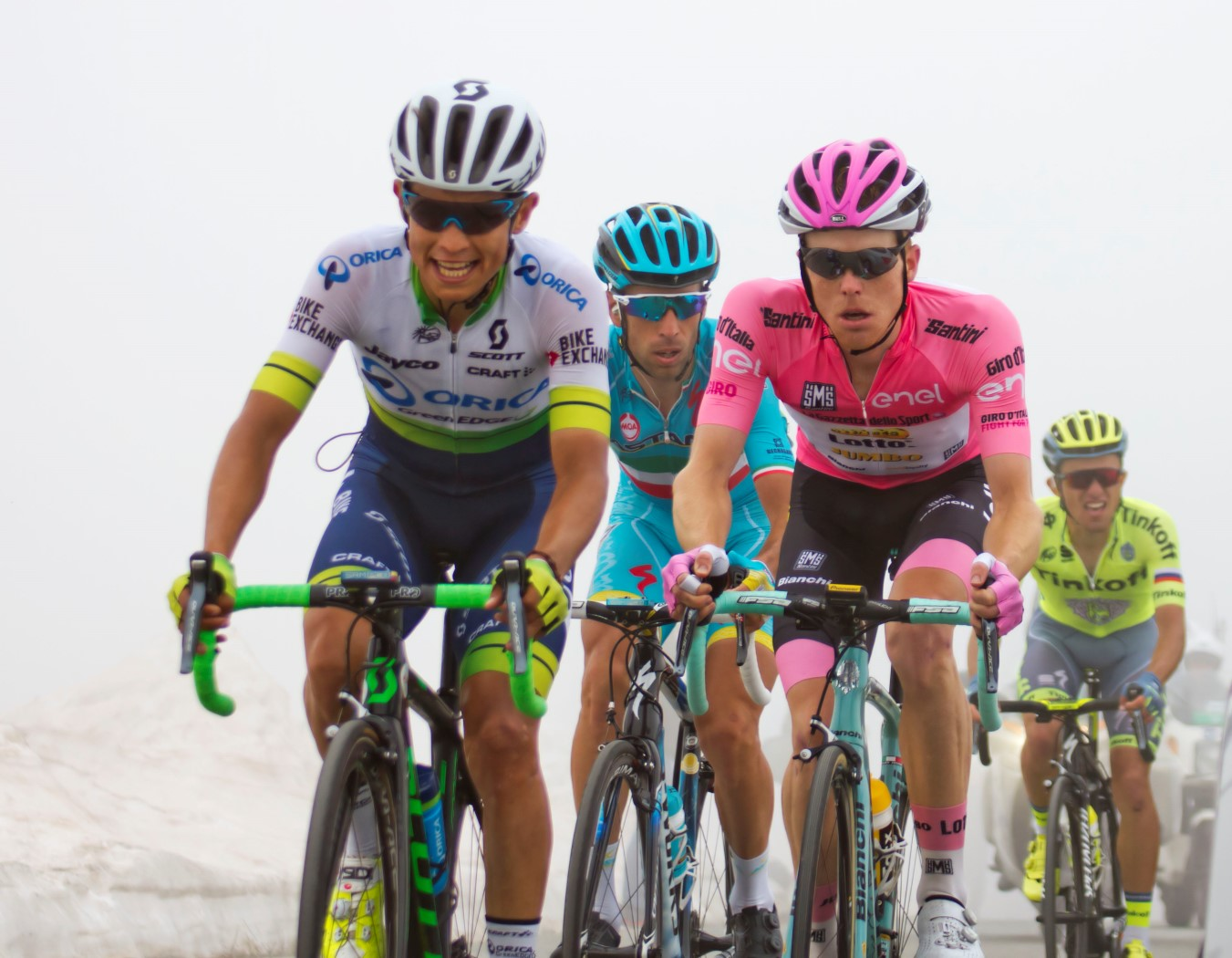 260 chaves nibali kruiswijk